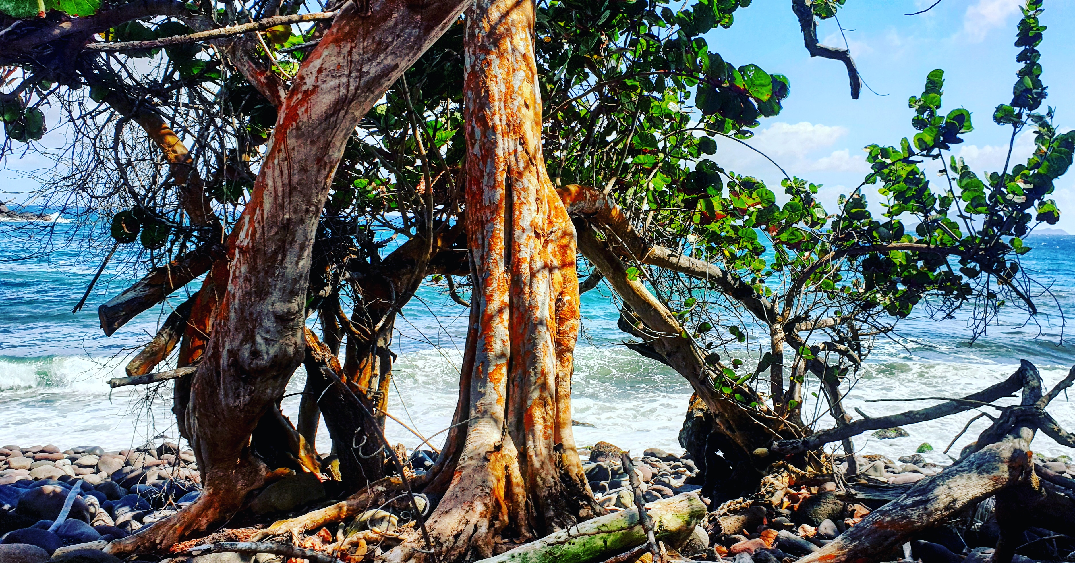 Plage bois Jolan st Anne Guadeloupe